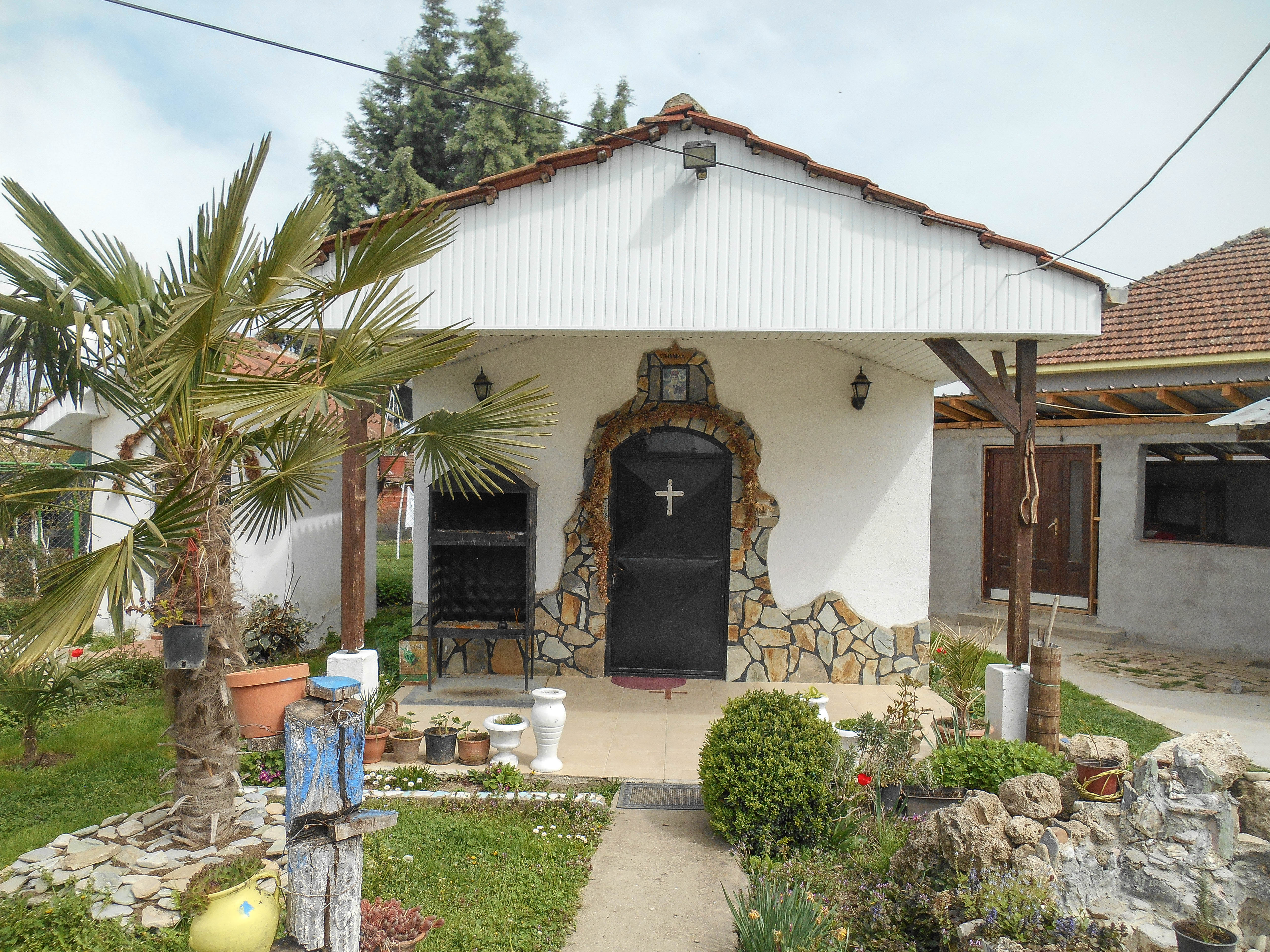 Црквата Свети Никола во Градско Балдовци